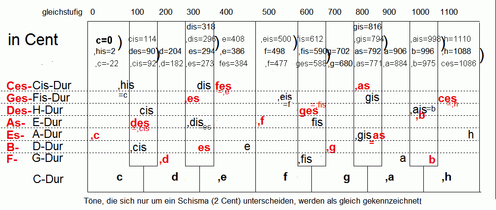 Darstellung des Quintenzirkels mit Eulerscher Schreibweise auf einet tastatur